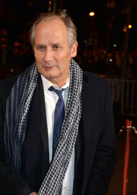 Hippolyte Girardot à la cérémonie des César